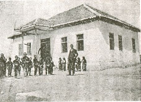 Сградата на първоначалното училище в с. Уши, Краище.